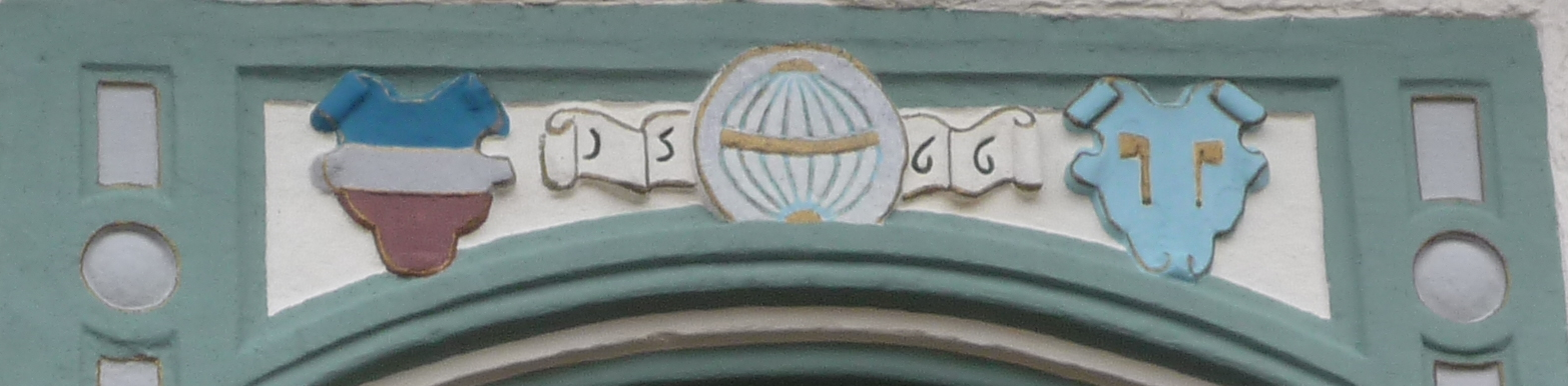 Portal in Aschbacherhof/Rheinland-Pfalz/Germany